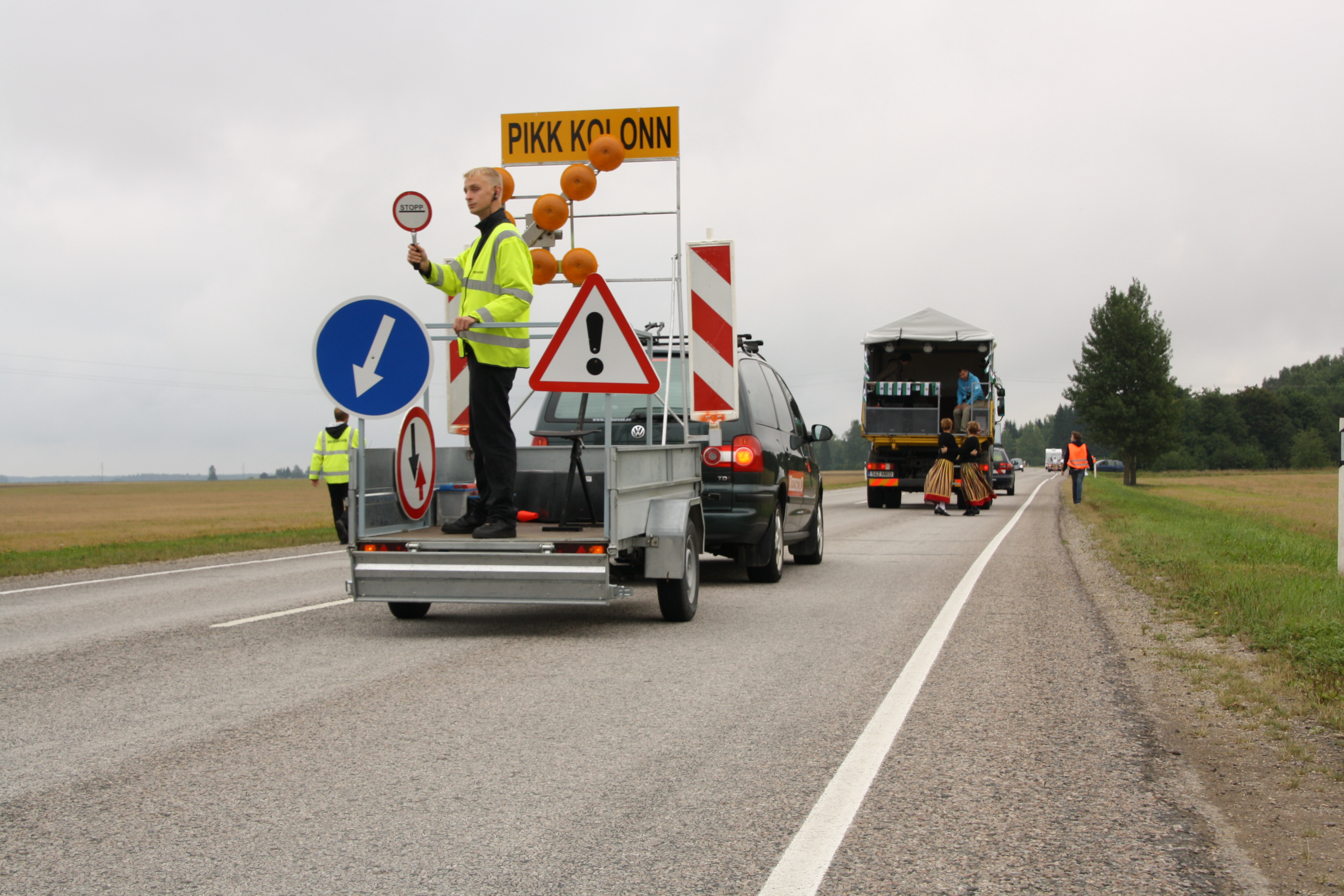 Teatetants 2011